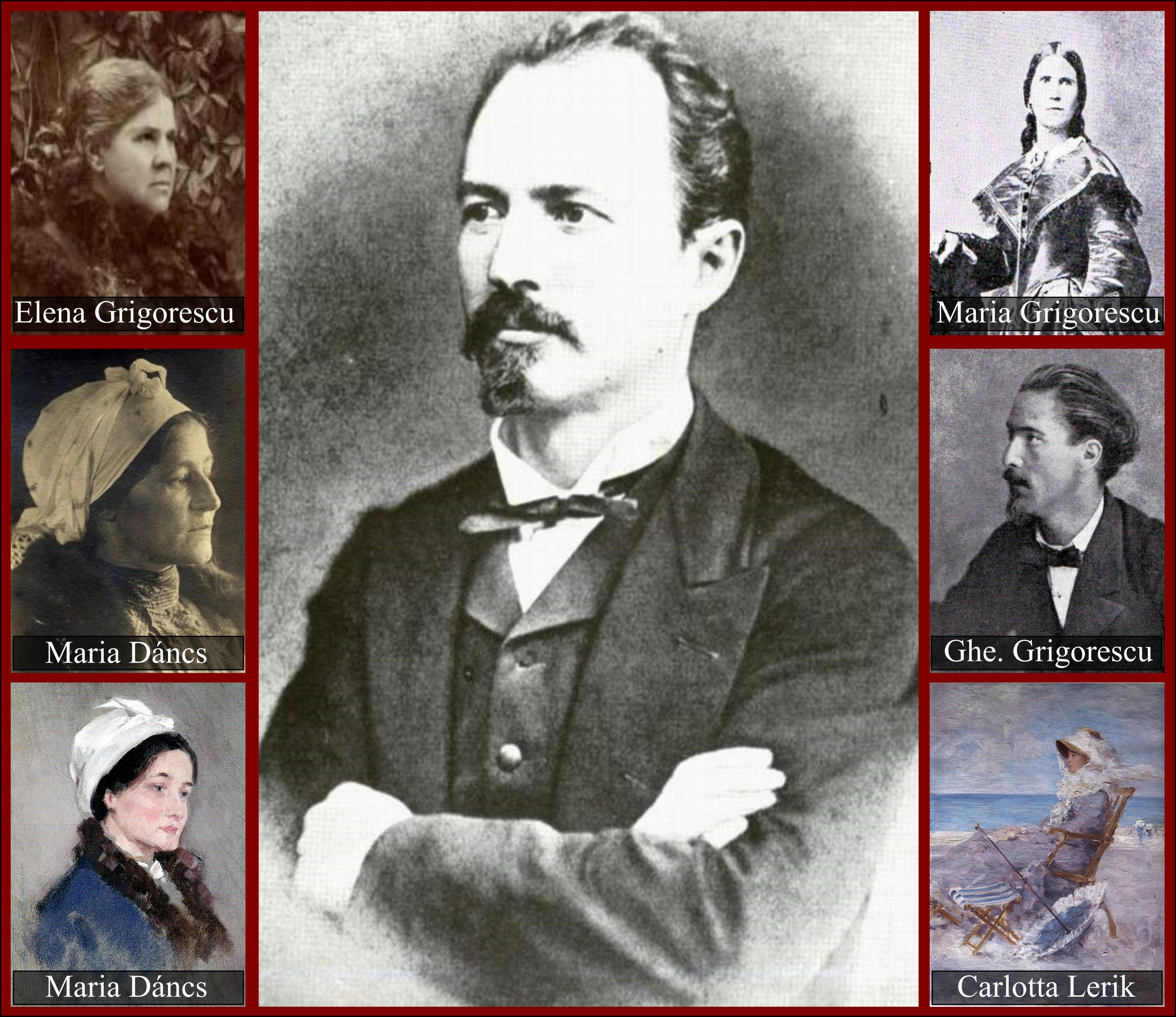 Colaj cu familia lui Nicolae Grigorescu